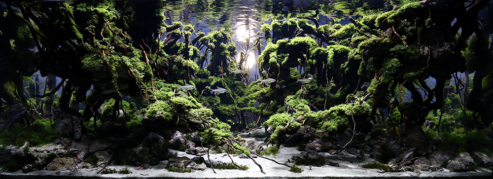 IAPLC2017 101위